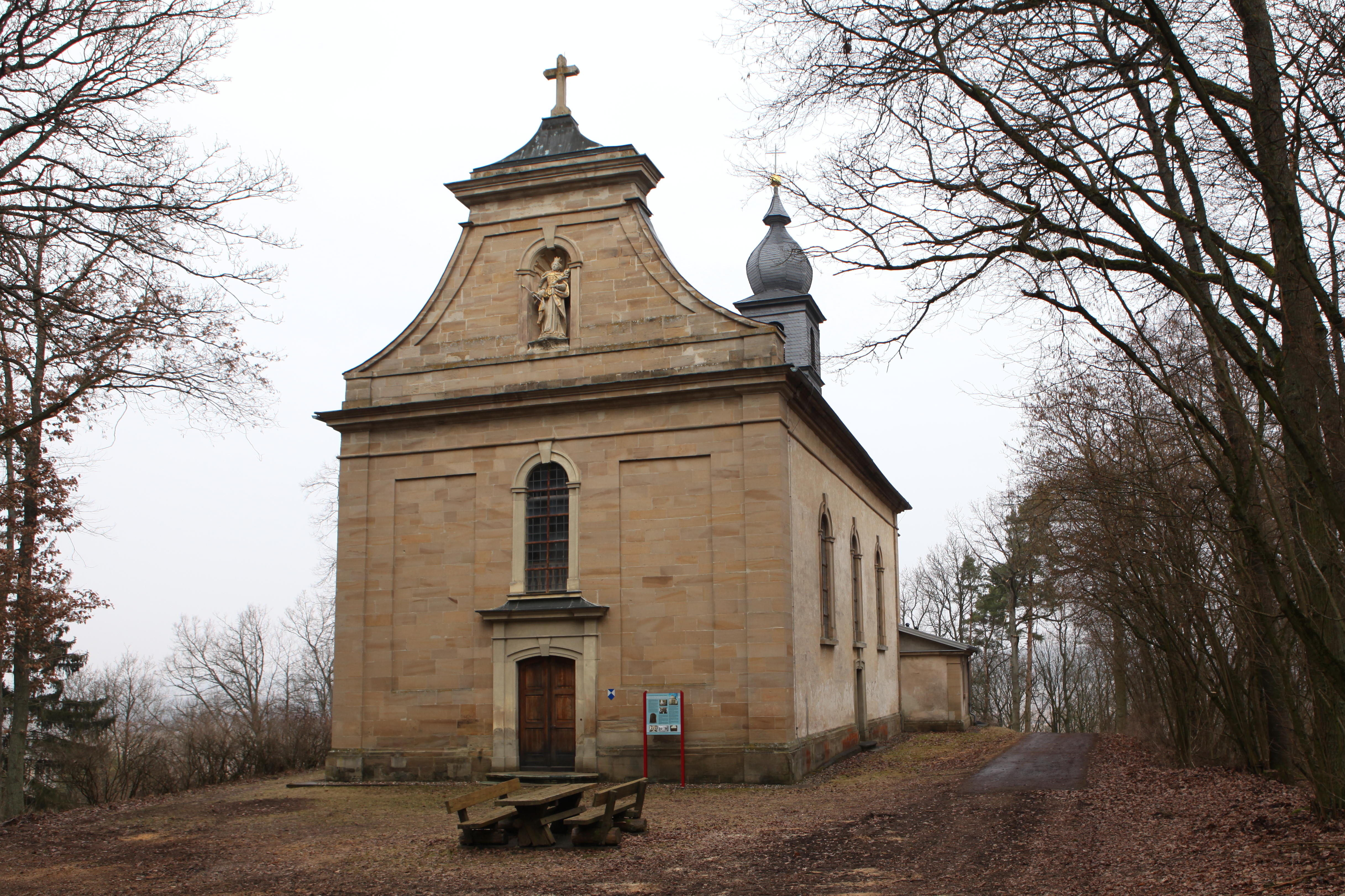 Wallfahrtskirche St. Ursula bei Alsleben, Landkreis Rhön-Grabfeld